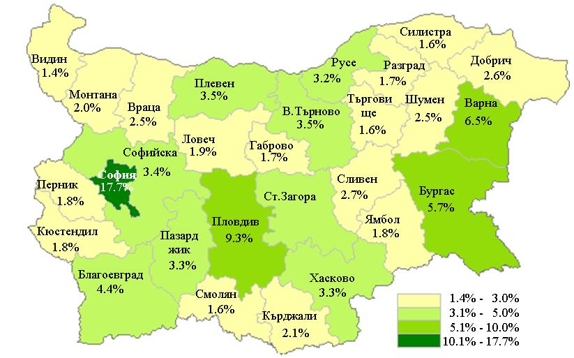 Население към 31.12.2011 по региони като част от общото население Градове с повече от 100 000 жители към 31.12.2011